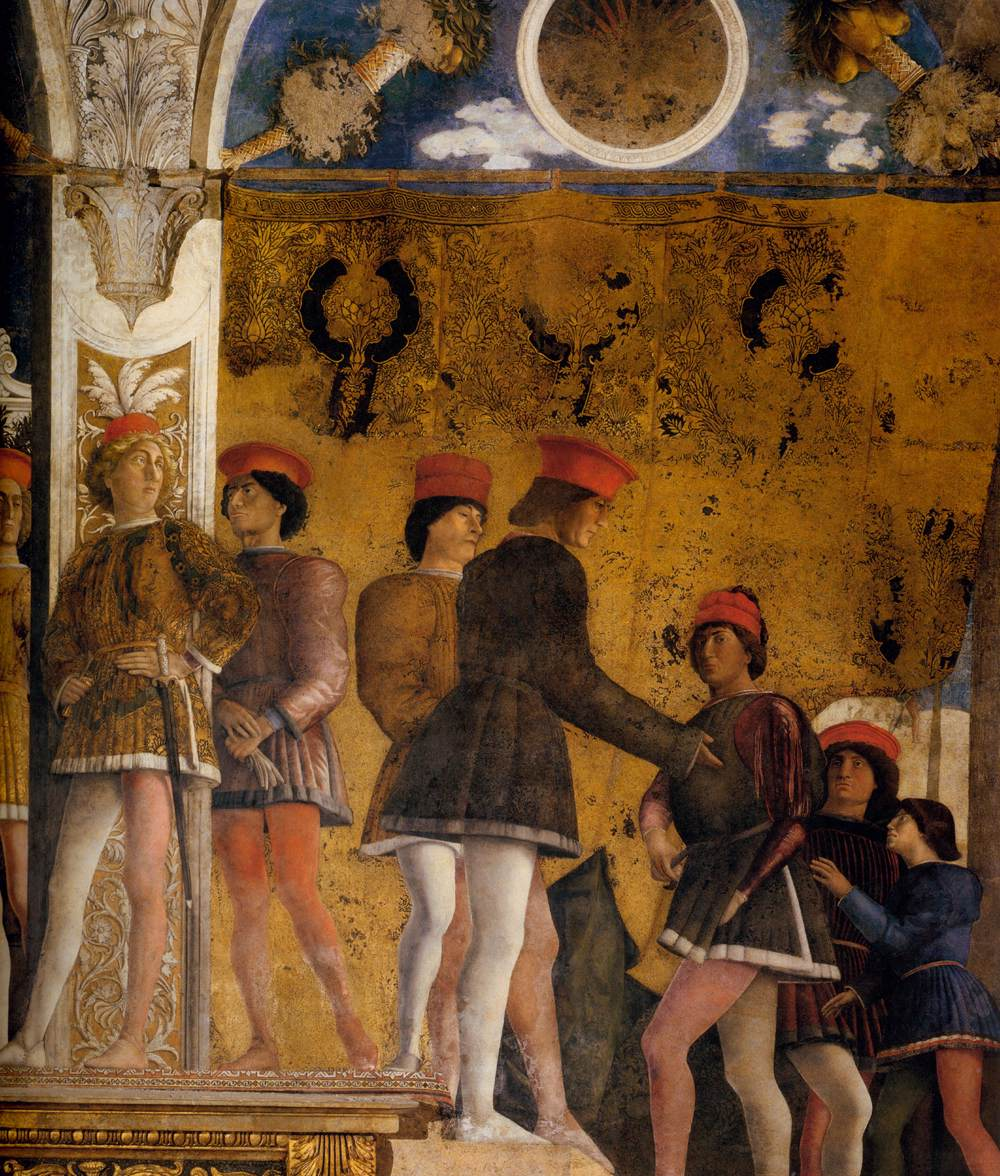 detail